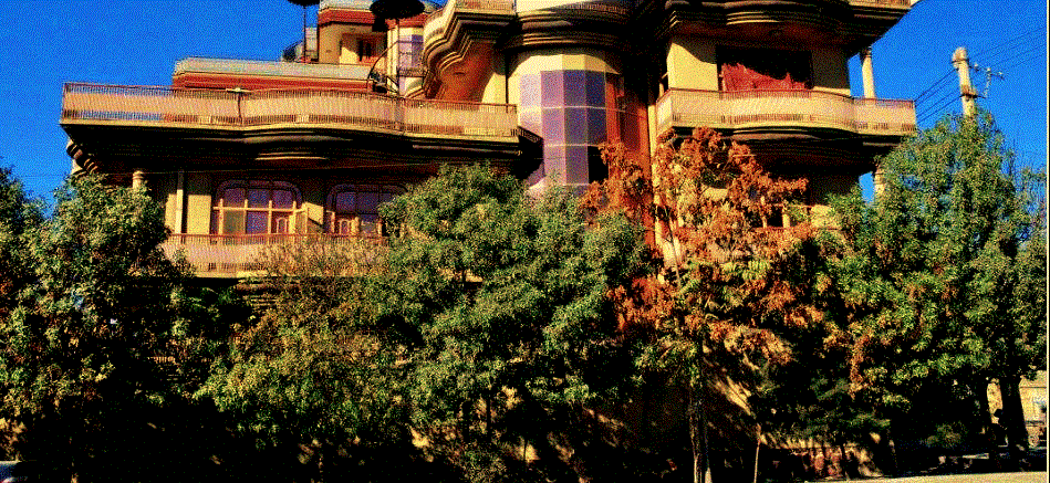 This image belongs to Rifah Afghanistan Institute این عکس متعلق به انستیتوت مسلکی رفاه افغانستان یا مؤسسه آموزش عالی رفاه افغانستان است.